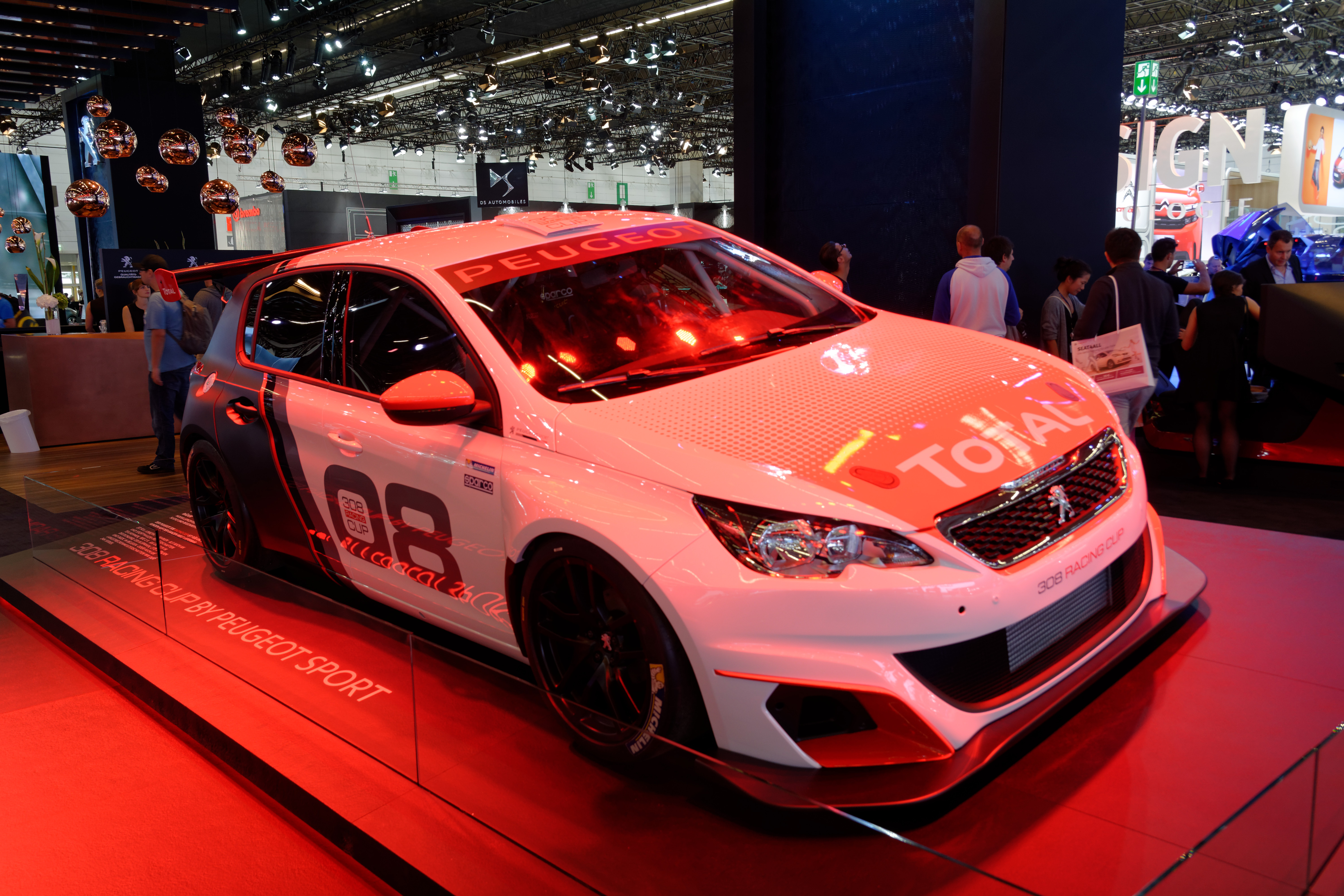 Peugeot 308 Racing Cup au Salon de Francfort 2015